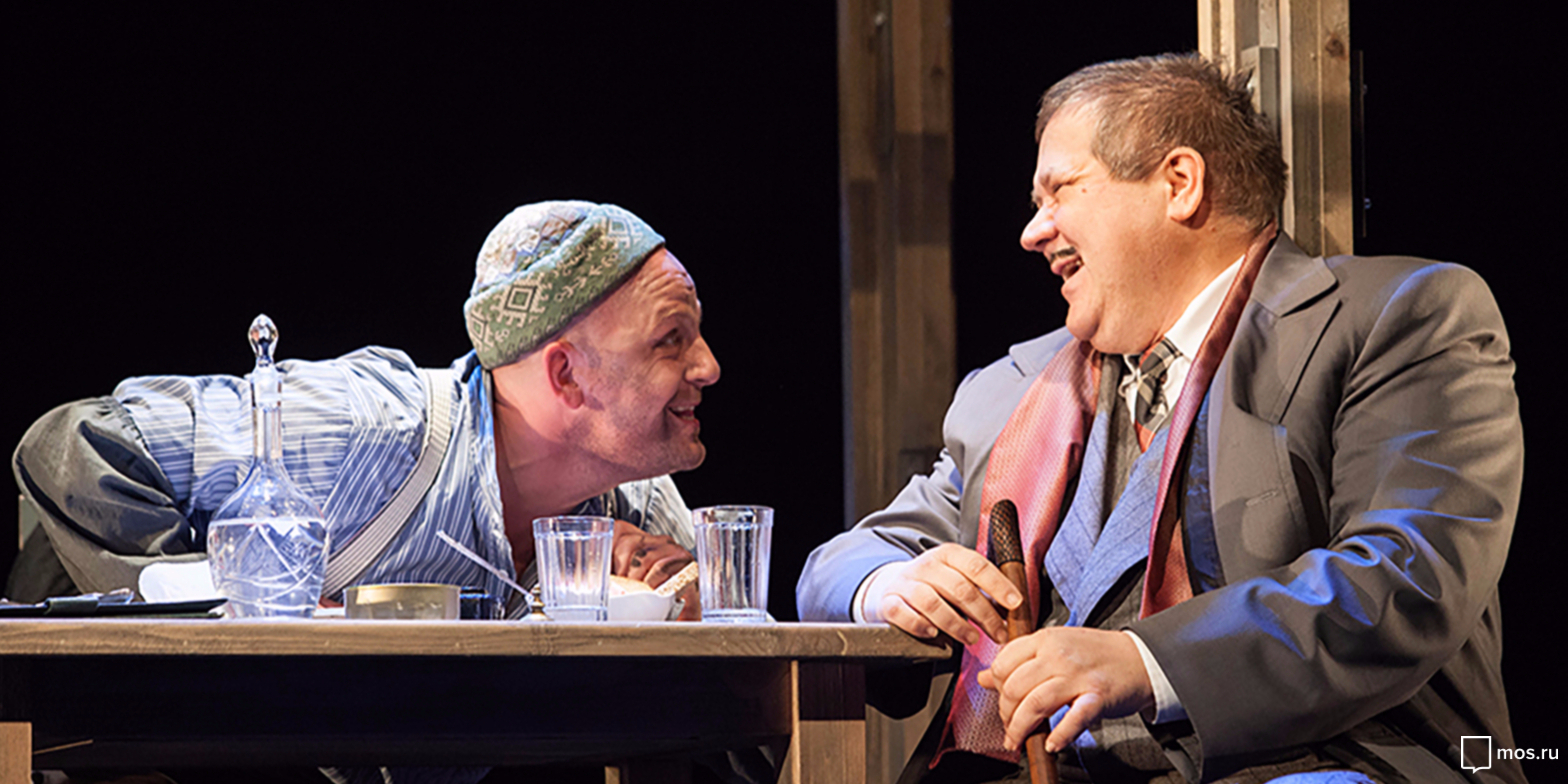 Спектакль Матросская тишина в театре Табакова